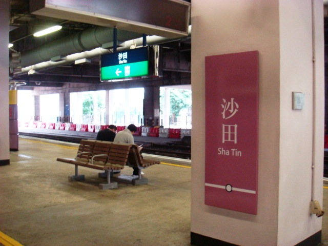 沙田站1